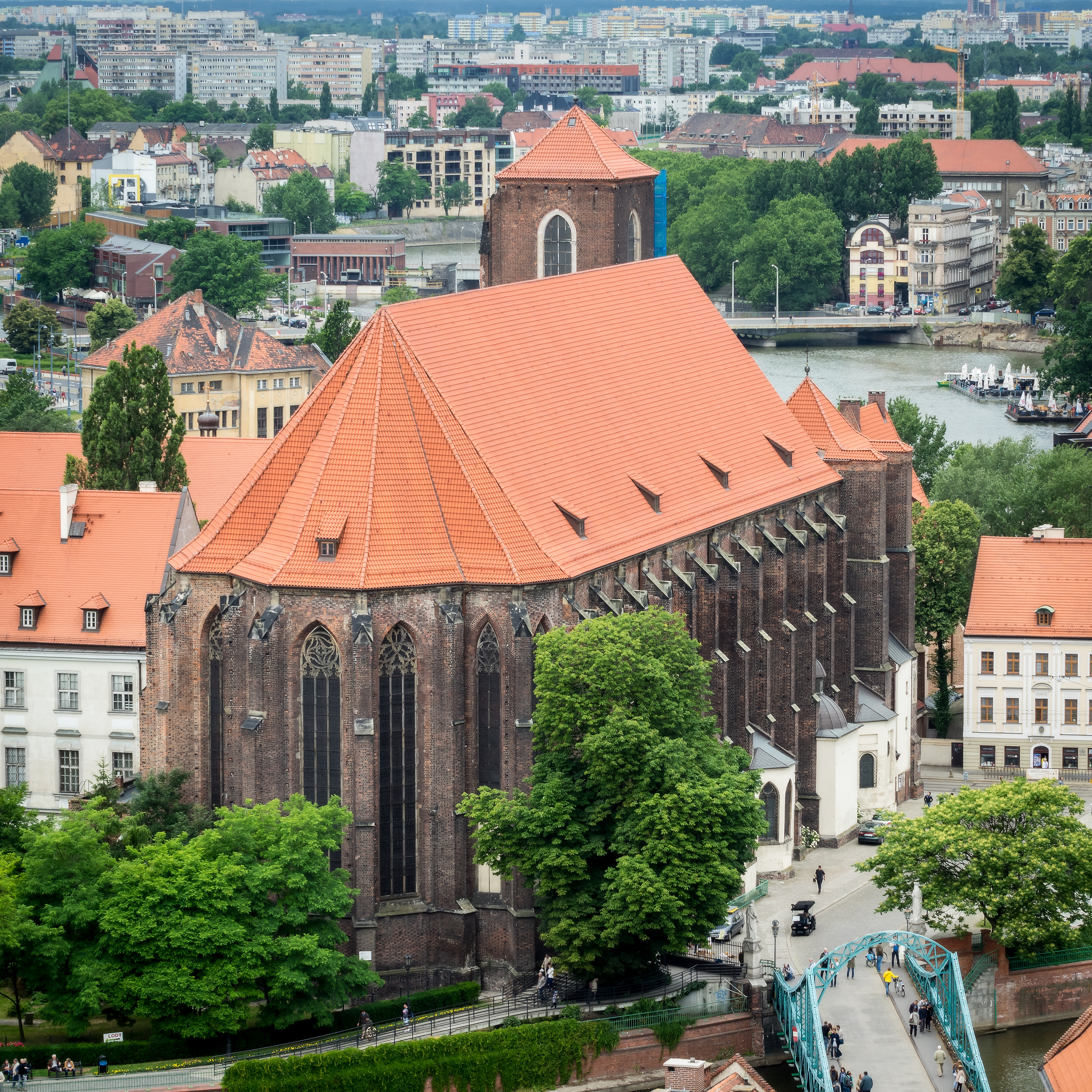 Wrocław, kościół p.w. Najśw. Marii Panny Na Piasku, 2 poł. XII, XVIII, po 1945